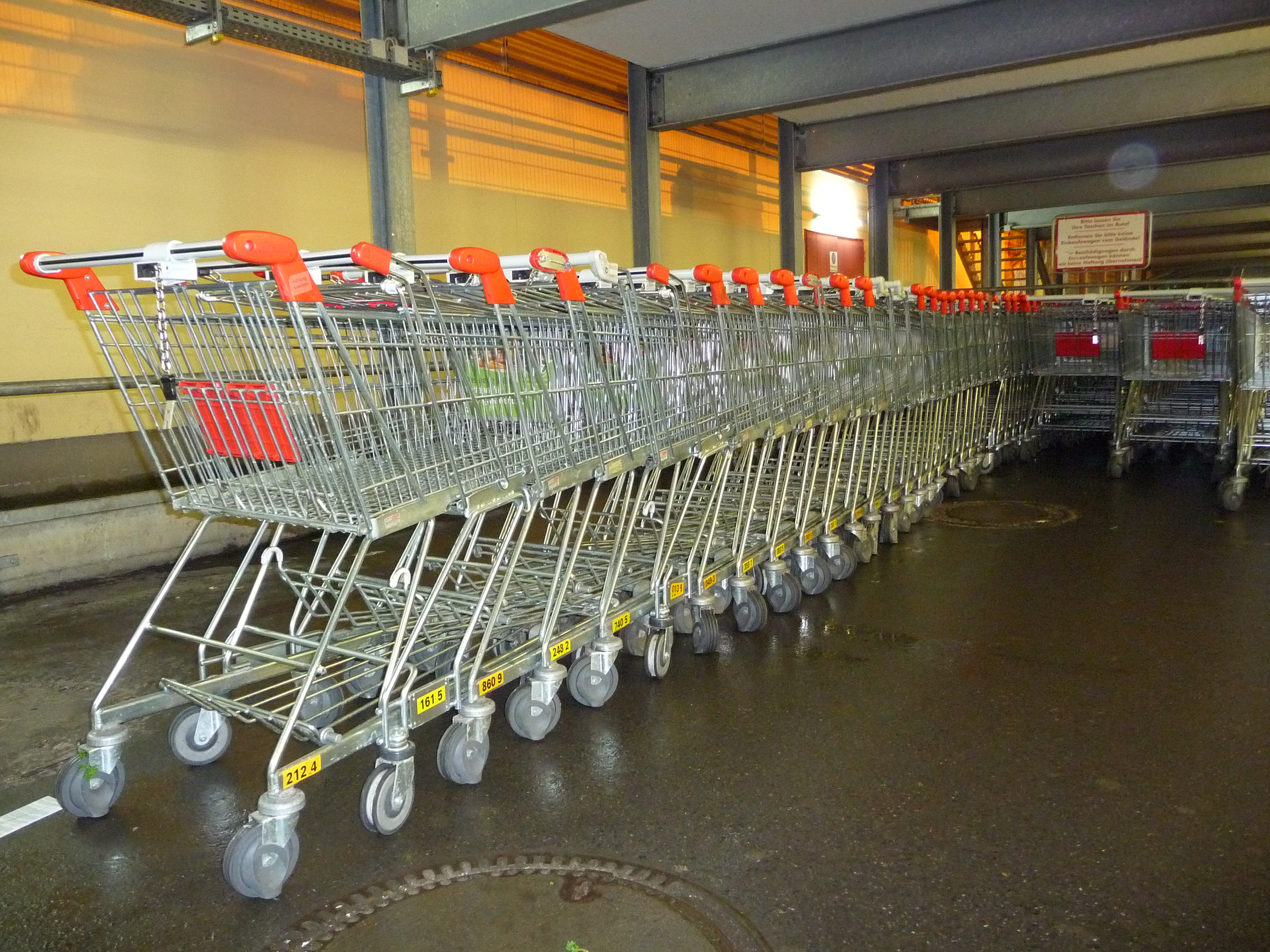 Ineinander aufgereihte Einkaufswagen in Heidelberg (Baden-Württemberg, Deutschland)